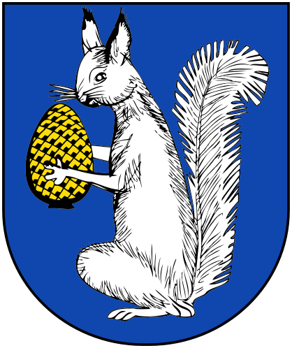 Das Wappen führte einst das im Mittelalter ansässige Adelsgeschlecht der urkundlich erstmals 1279 bezeugten edlen Ritter von Liebenegg.